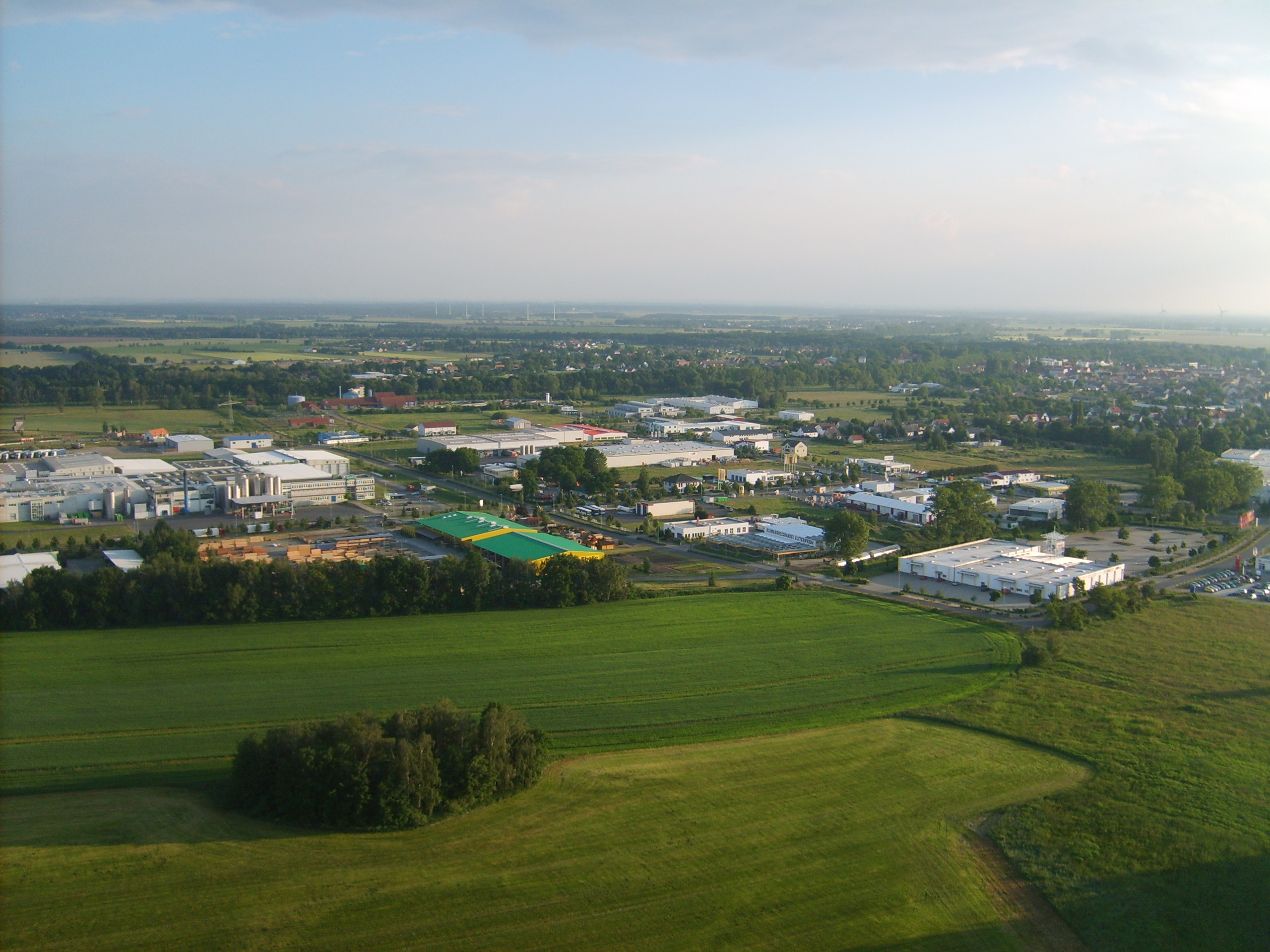 Das Gewerbegeiet in Elsterwerda.